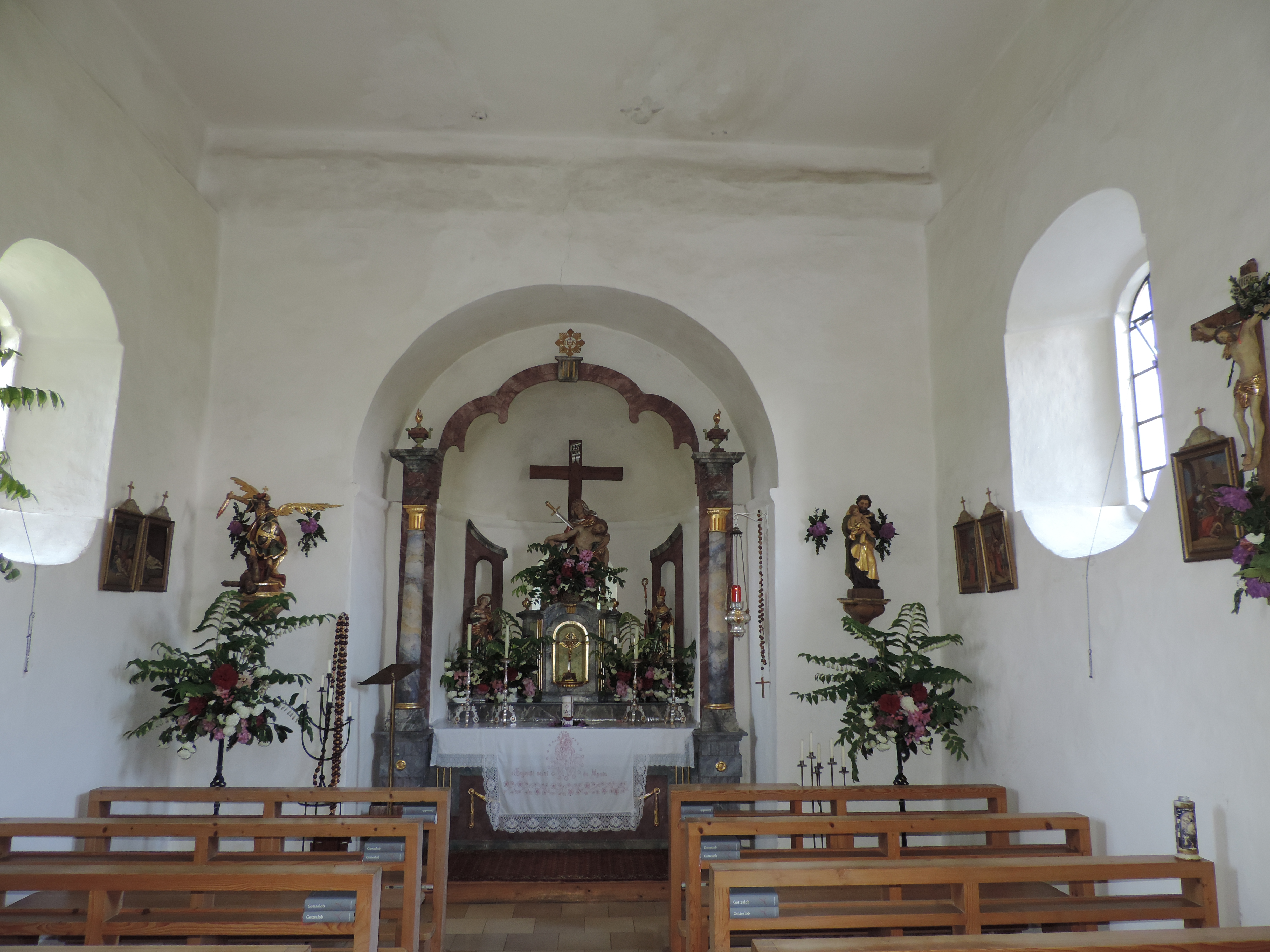 Innenraum